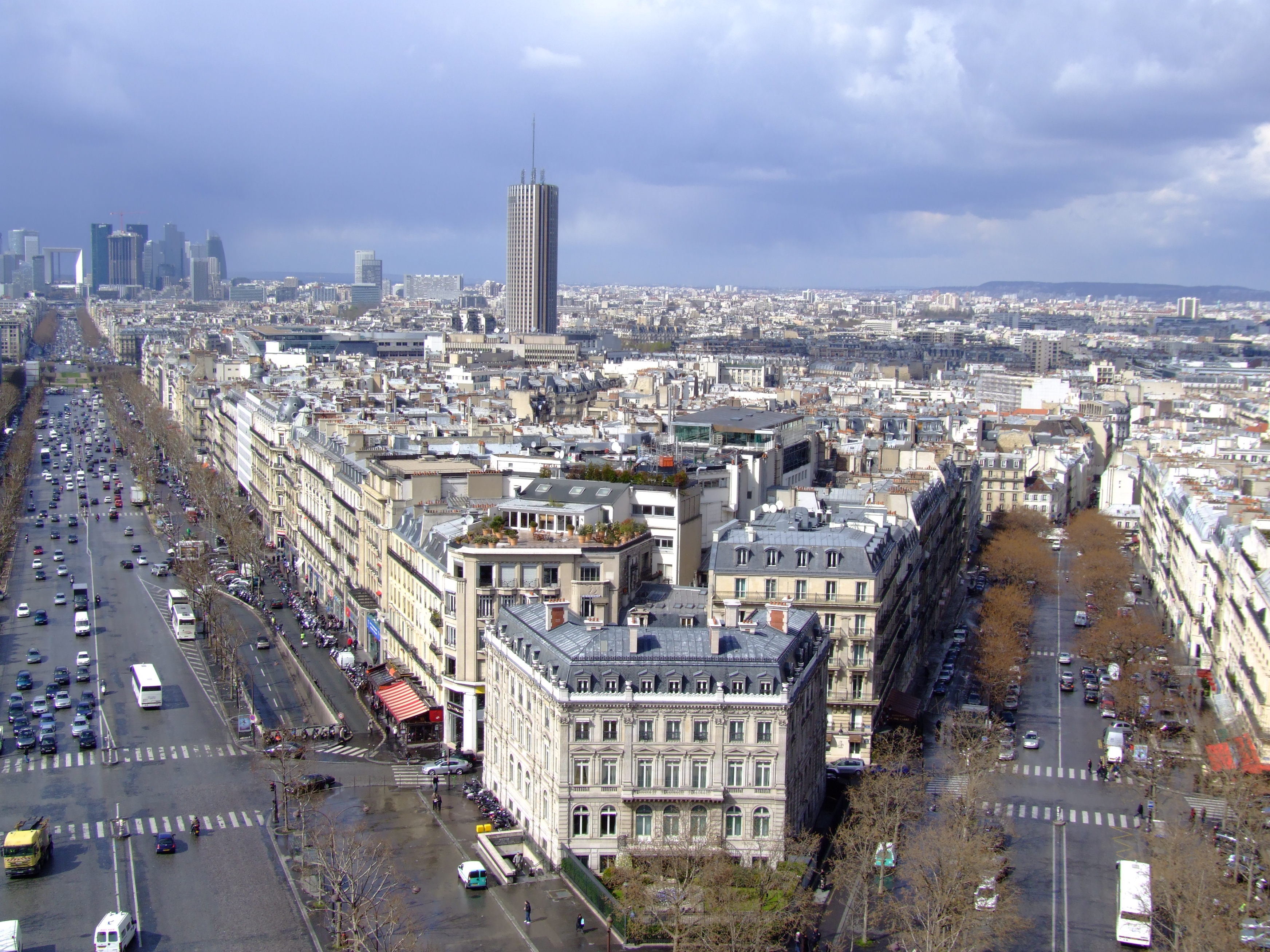 Avenue de la Grande Armée et Avenue Carnot depuis le sommet de l'Arc de Triomphe, Paris, France.